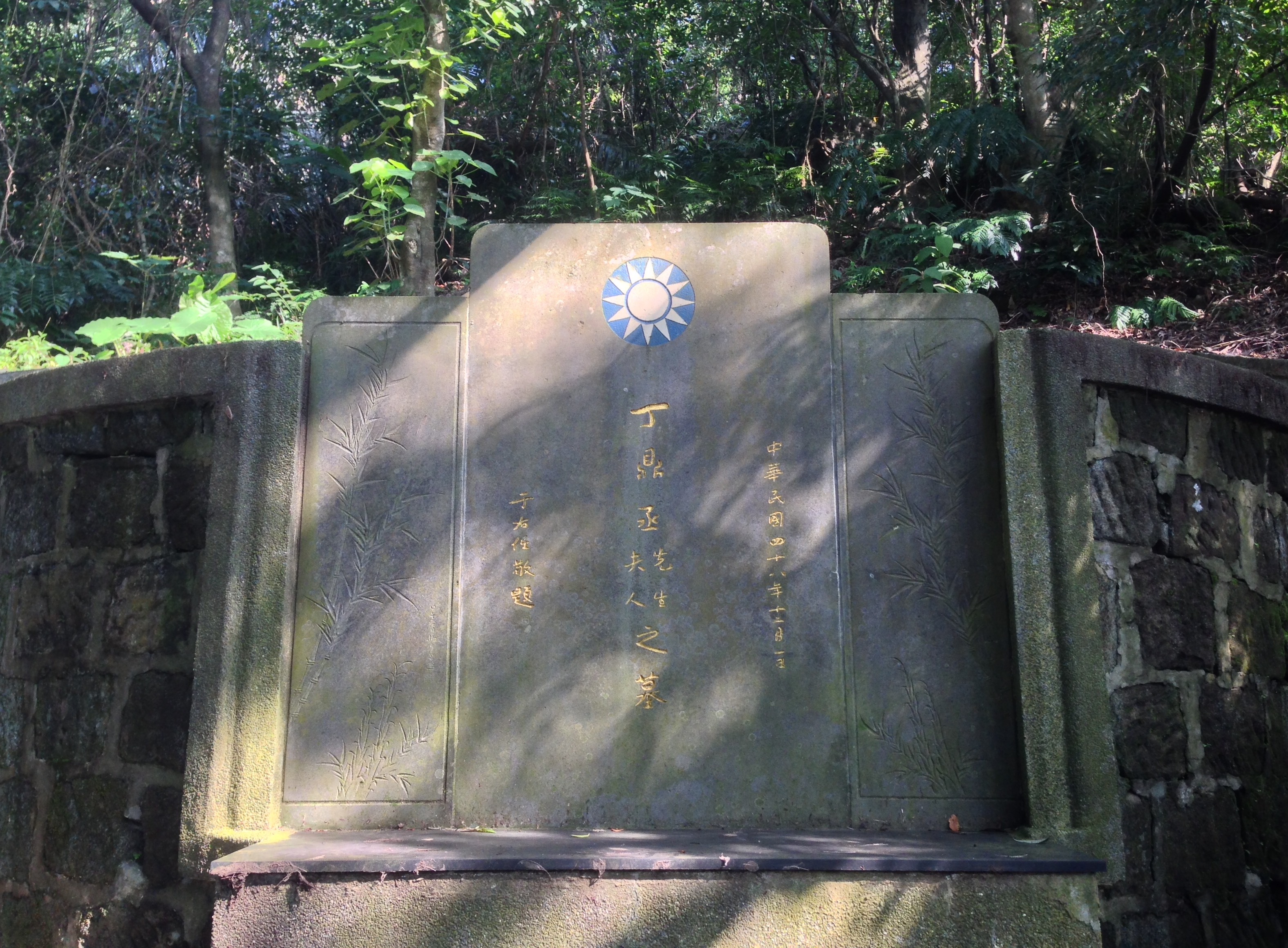 丁惟汾墓近照